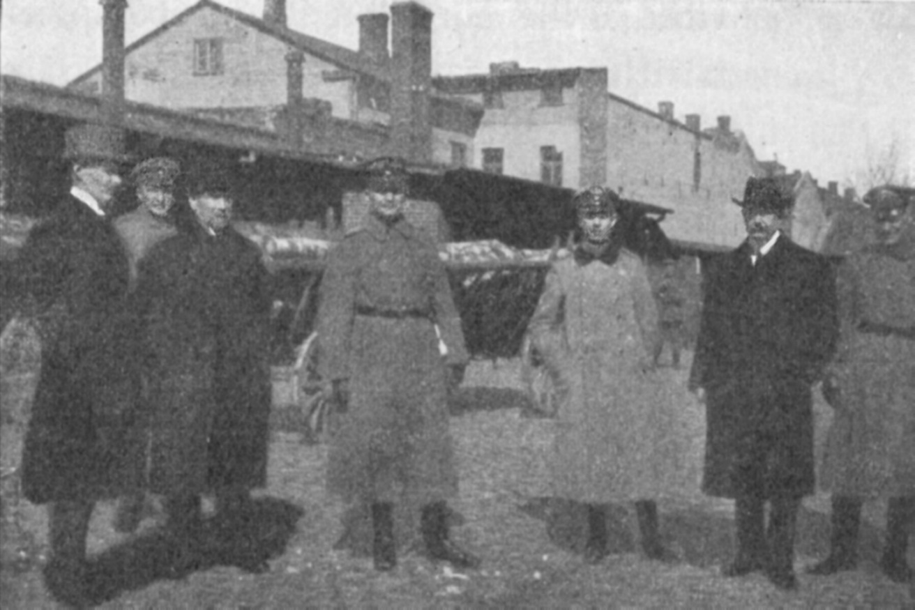 Suomen luottamusmies lähetystö Libaussa vuonna 1917.